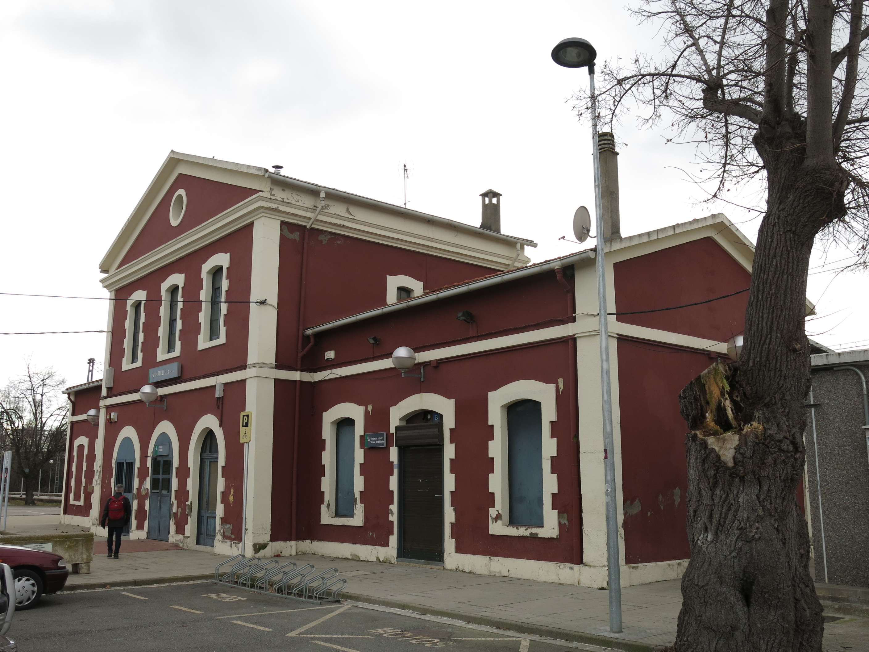 Edifici de l'Estació (Manlleu)